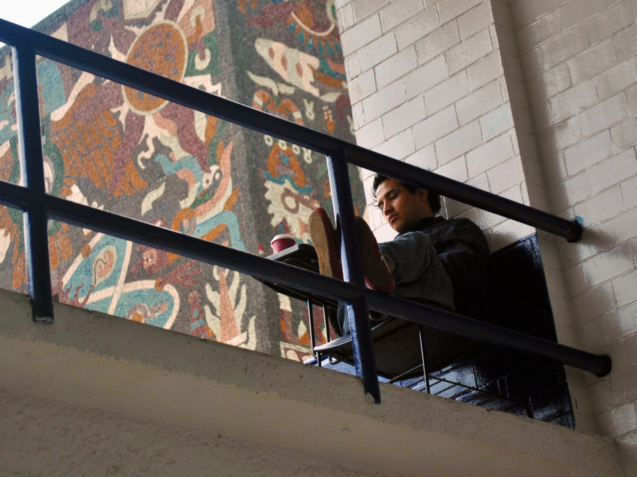 Un buen libro y un buen café. Facultad de Filosofía y Letras de la UNAM.